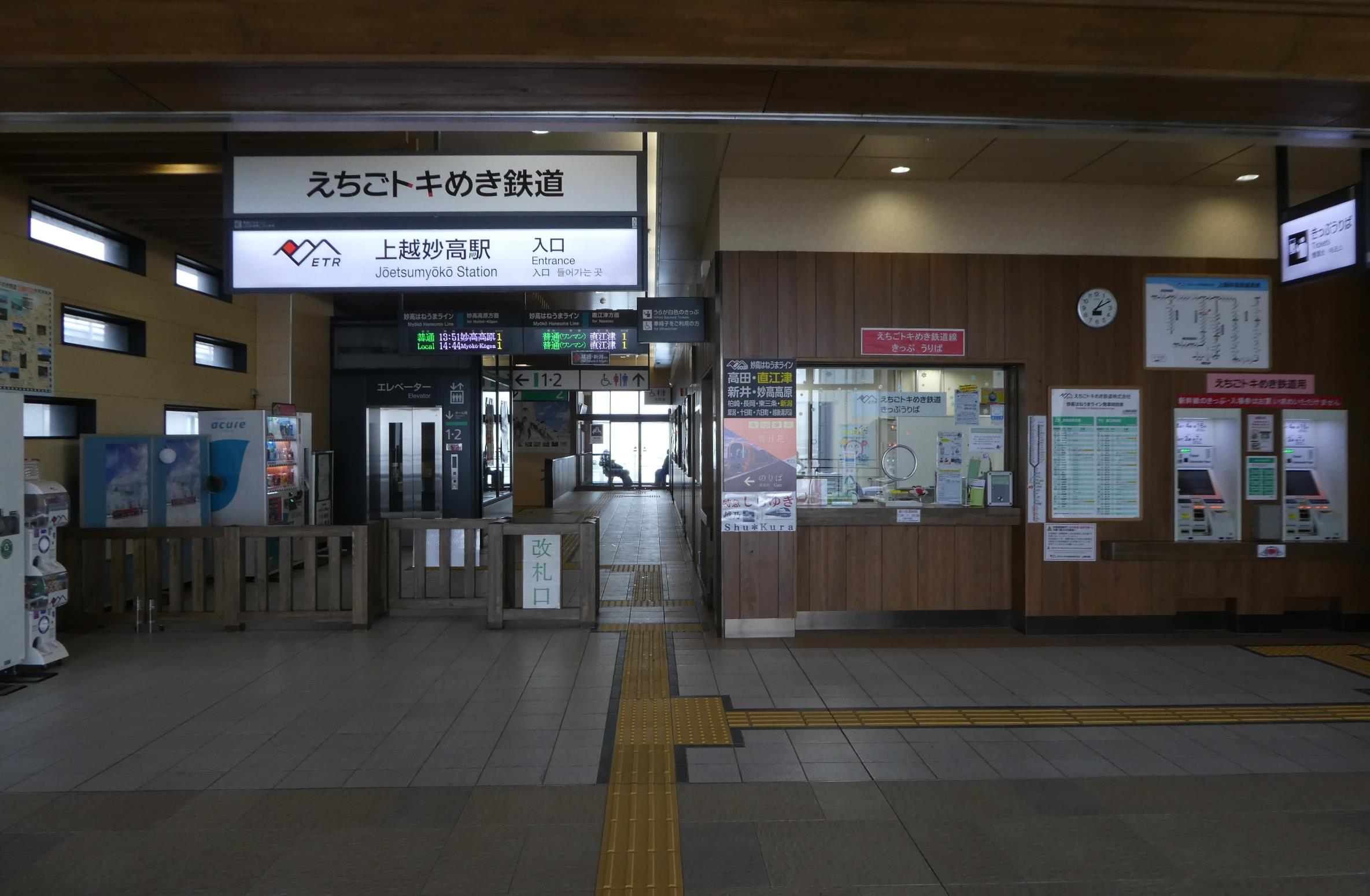 上越妙高駅、えちごトキめき鉄道改札前。